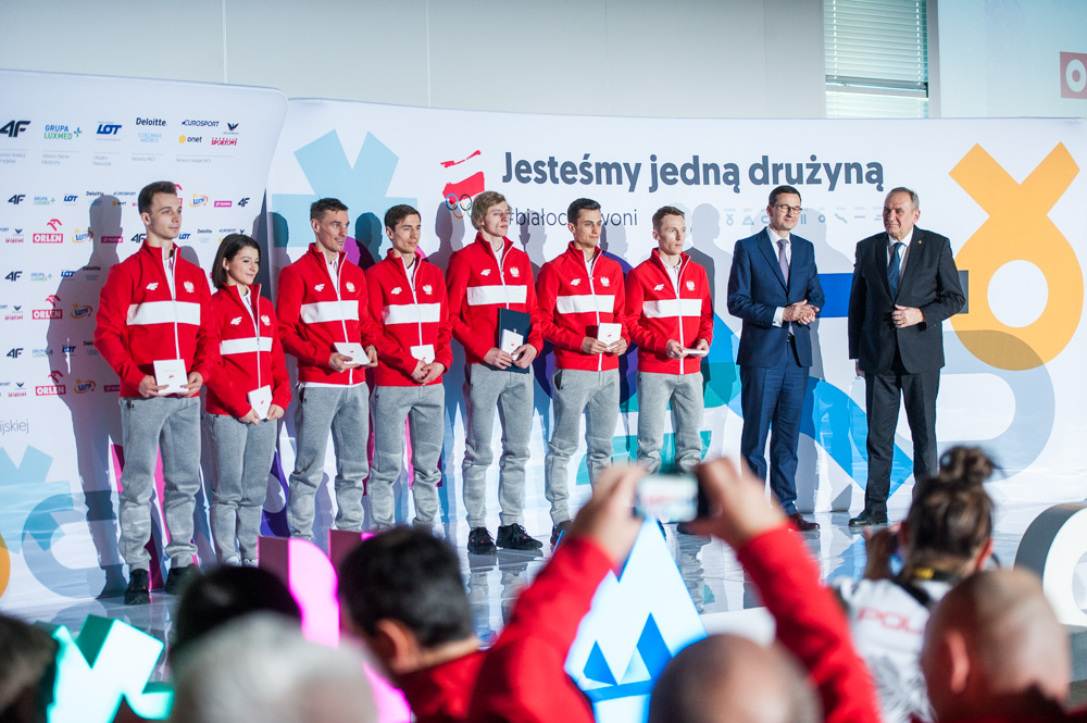 2018.02.05 Warszawa | Premier Mateusz Morawiecki wziął udział w uroczystości ślubowania ekipy olimpijskiej reprezentującej Polskę na Zimowych Igrzyskach Olimpijskich w PyeongChang 2018. Fot. W. Kompała / KPRM